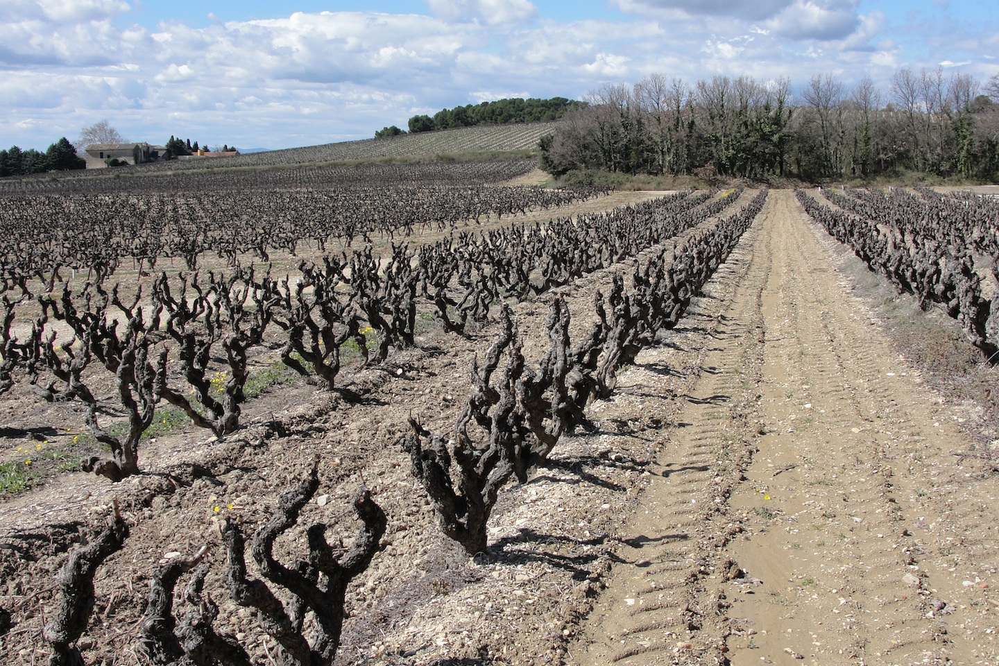 Terroir viticole du domaine des Lauribert à Visan